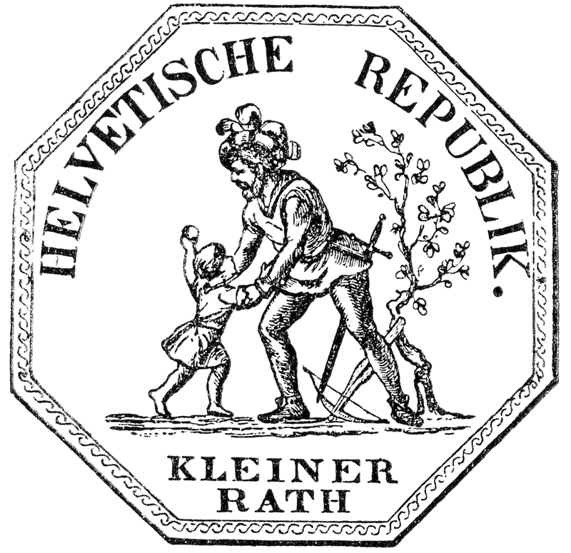 Das Siegel des Kleinen Rates der Helvetischen Republik